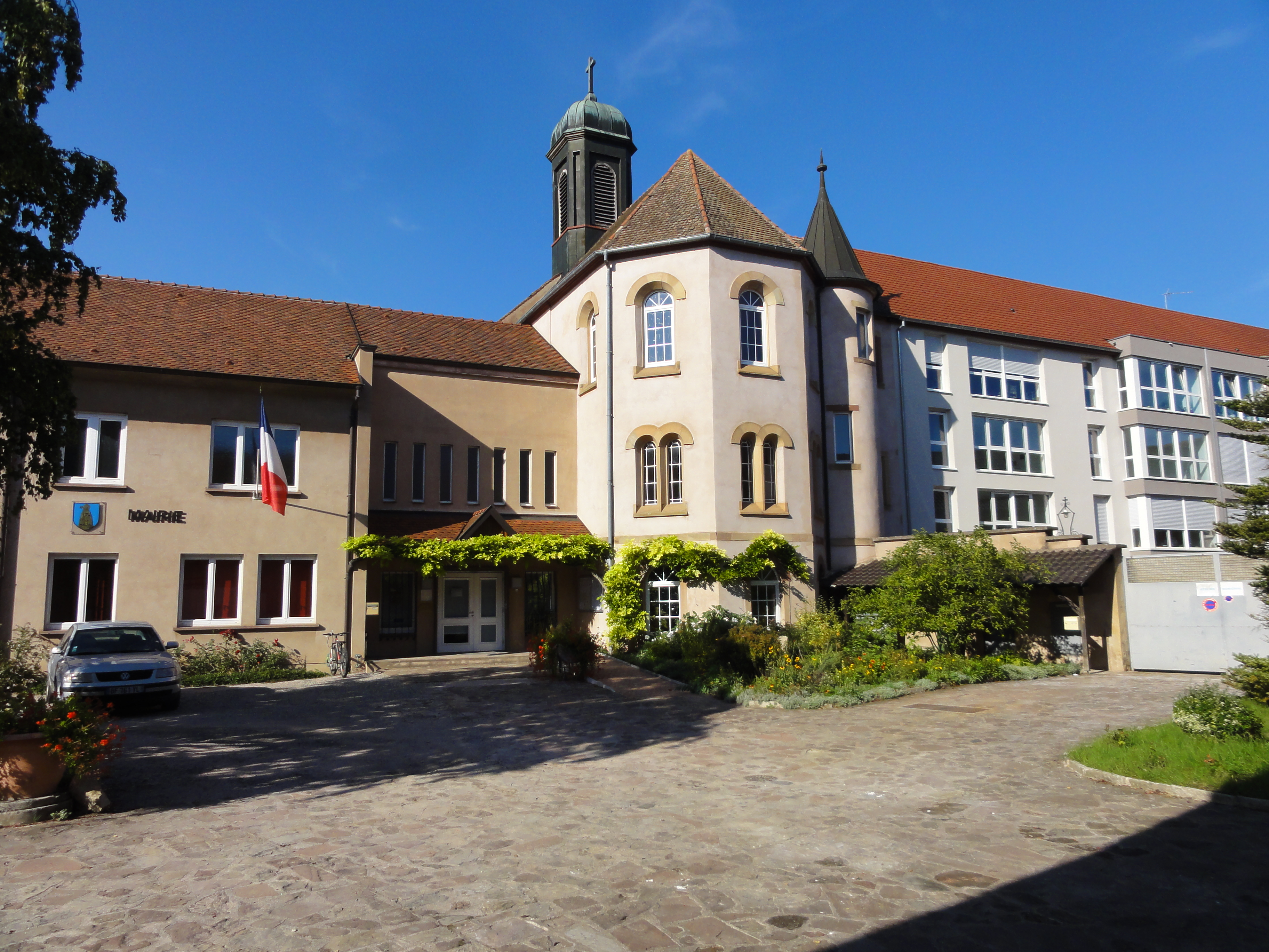 Alsace, Bas-Rhin, Ergersheim, Ancien couvent de trappistines Notre-Dame d'Altbronn (XIXe), actuellement mairie, bâtiments municipaux et logements, 16 rue Principale (IA67011804).